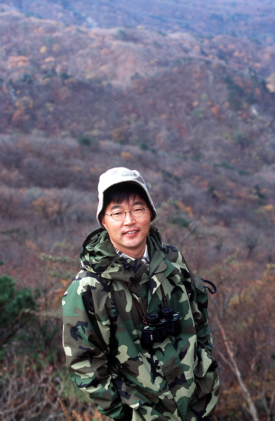 춘천문화방송 기자 전영재, The Korean Demilitarized Zone